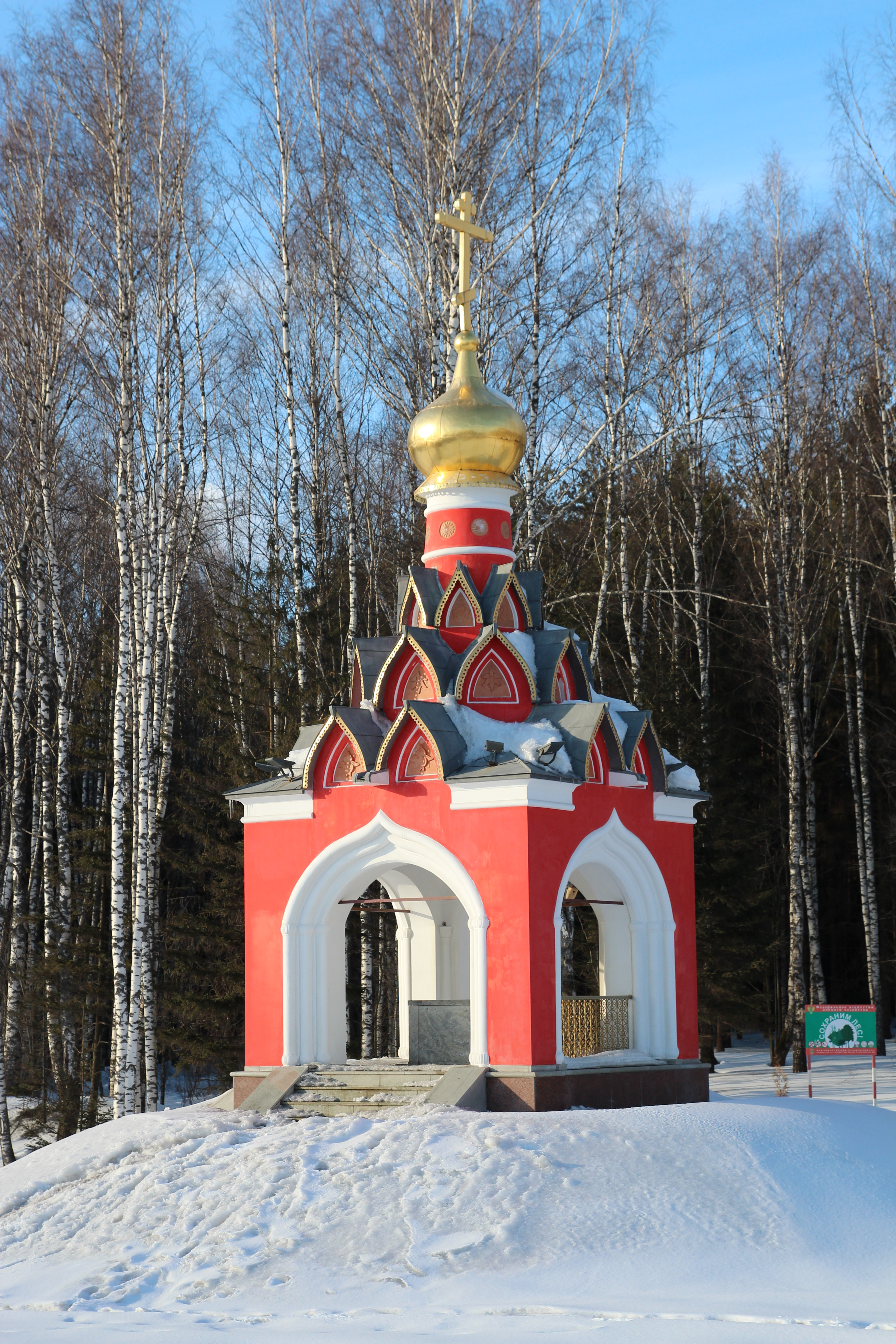 Часовня в честь иконы Божьей матери у истока Москвы